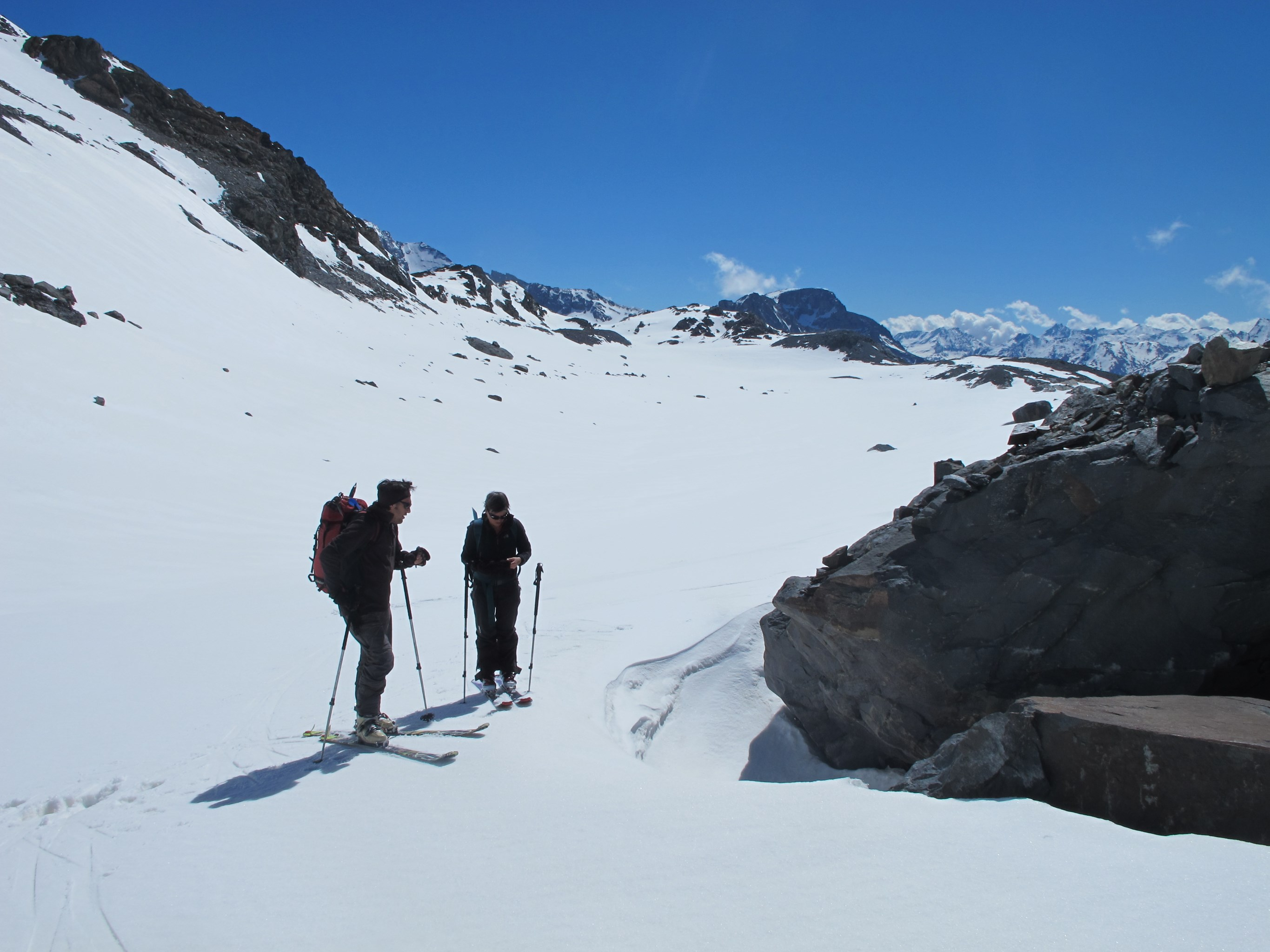 Juste devant le lac café au lait en Savoie dans le Parc National de la Vanoise